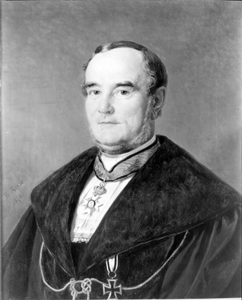 Prof. Victor von Bruns (Öl auf Leinwand, 79,8 cm × 58 cm; Tübinger Professorengalerie)